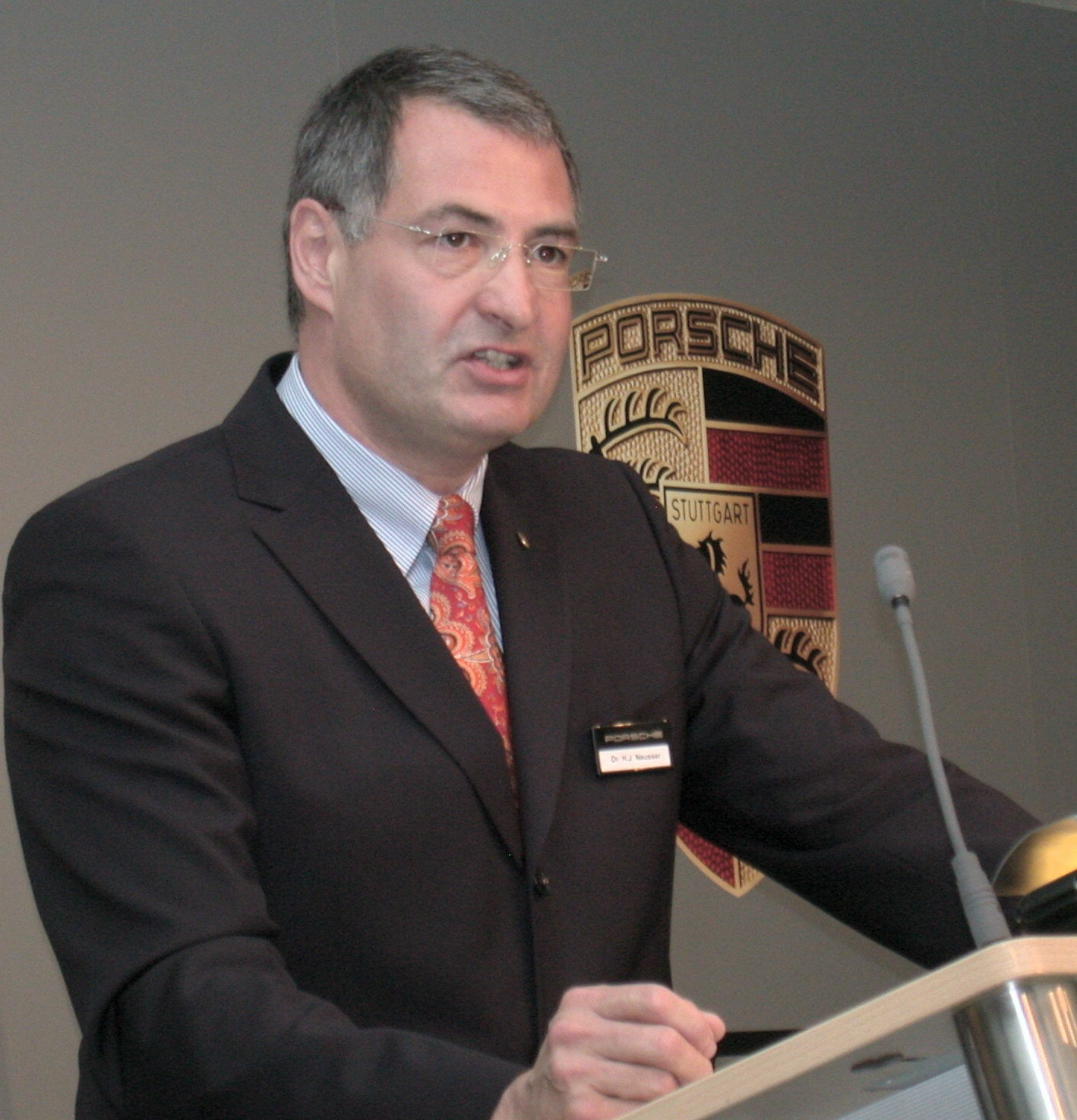 Dr. Heinz-Jakob Neußer als Chefentwickler Antrieb bei der Porsche AG in 2008.